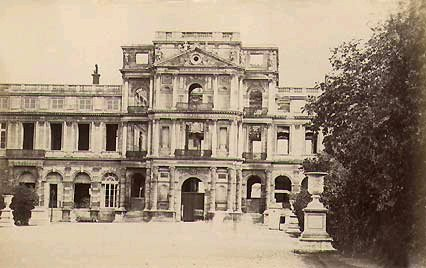 Pavillon central côté Jardin